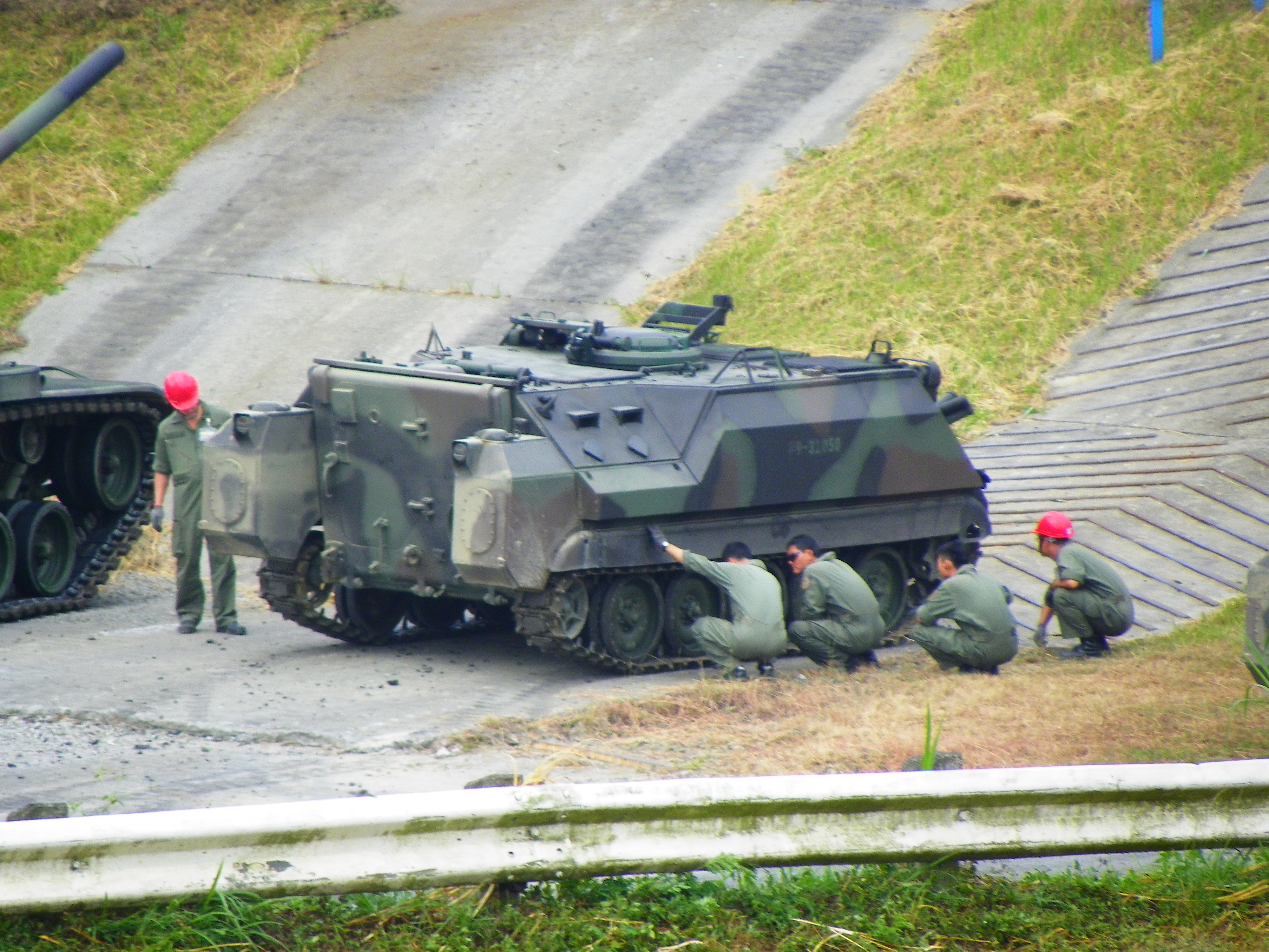 整備兵檢查CM-21A的車輪與懸掛系統。